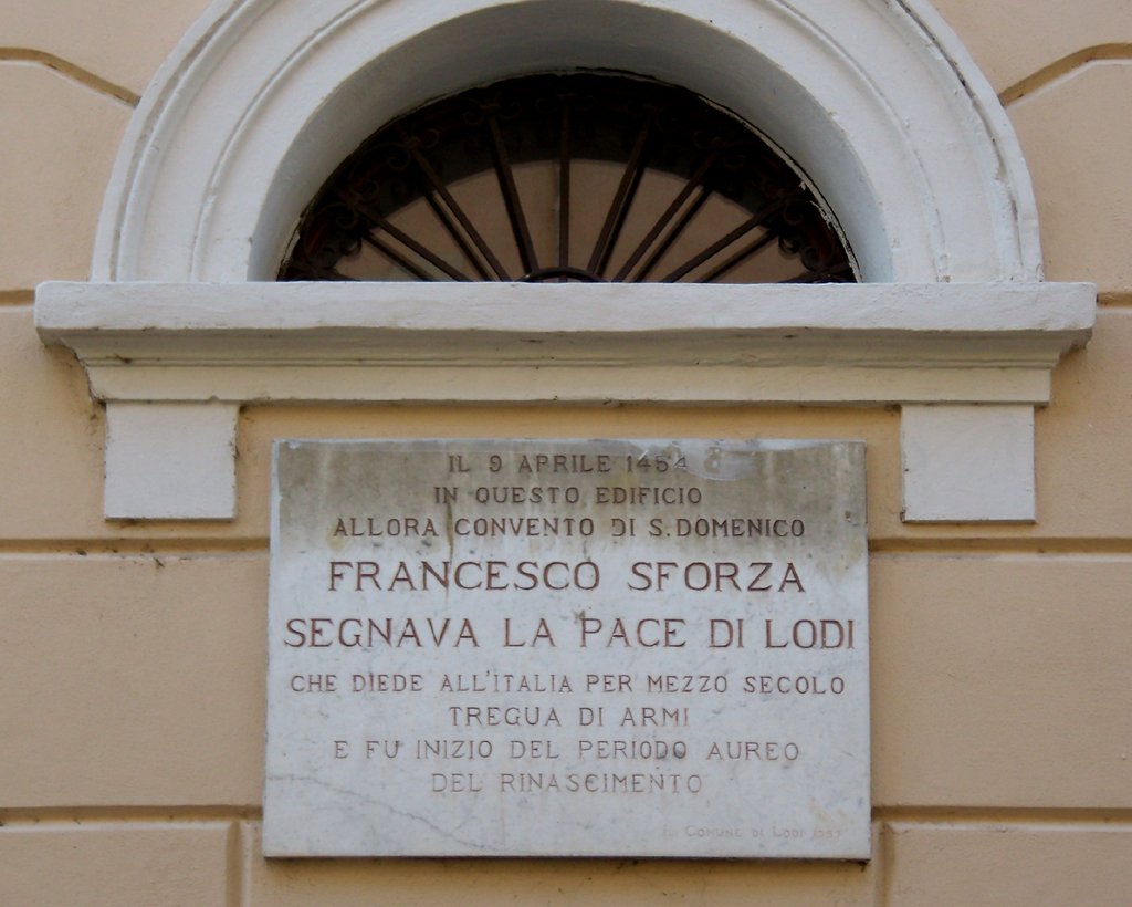 Targa apposta su un muro dell'ex convento di San Domenico a Lodi, a ricordare la Pace di Lodi